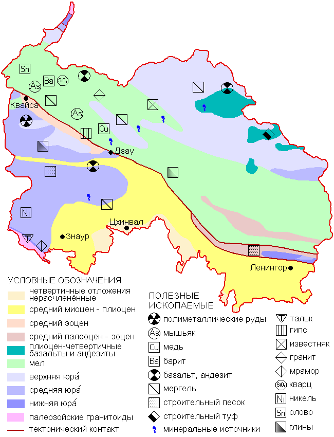 Geological map of South Ossetia